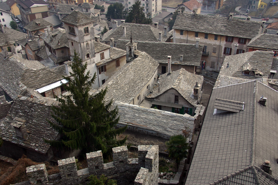 Il centro di Vogogna (VB) dalla torre del Castello